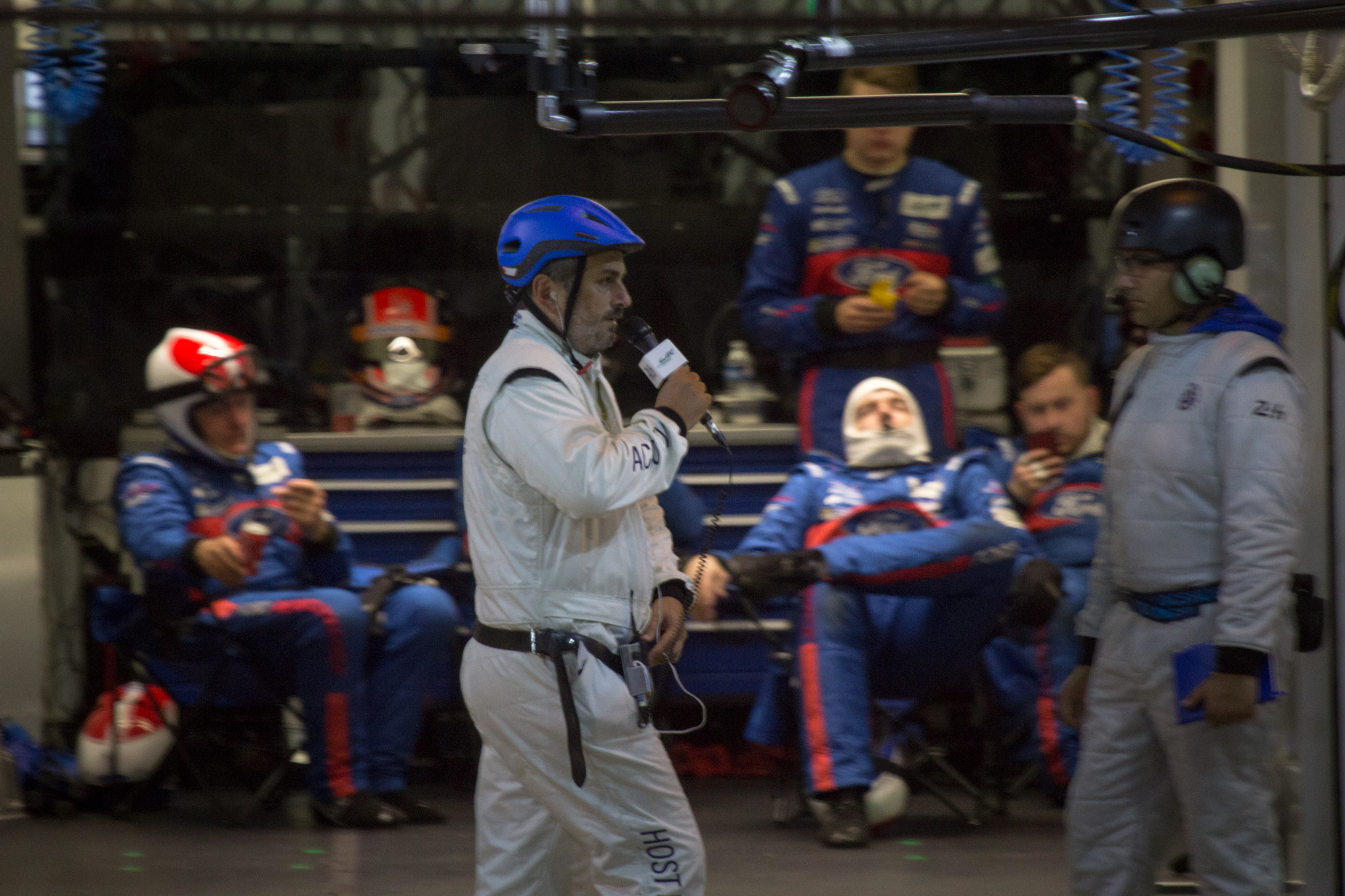 24 Heures Le Mans 2016